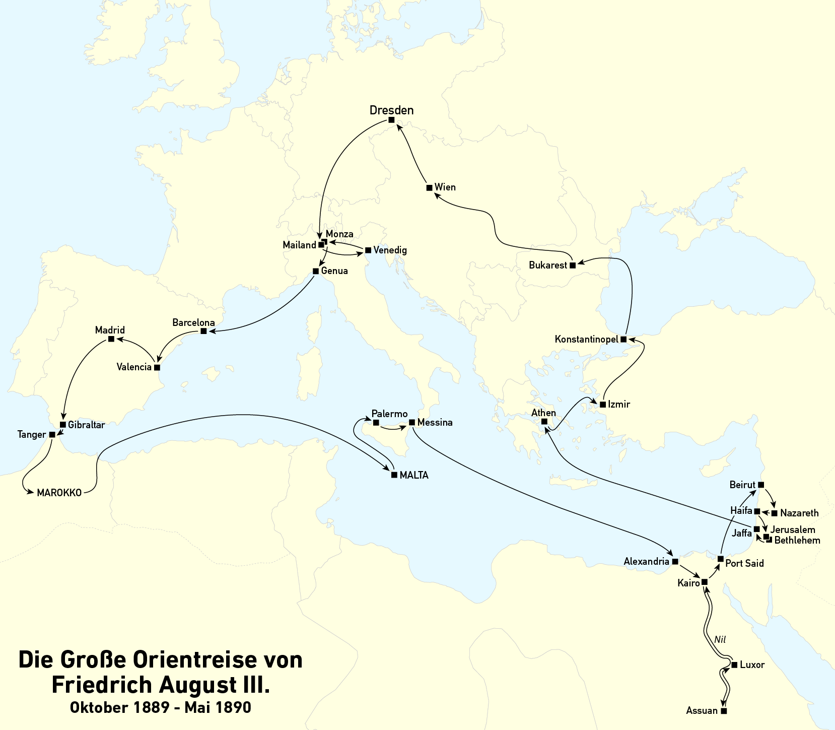 Karte der Großen Orientreise von Friedrich August III. (Oktober 1889 - Mai 1890)